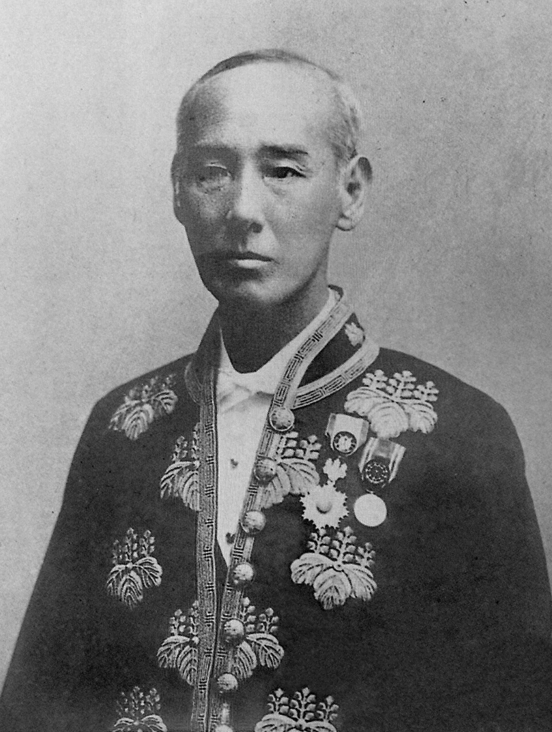 黒田長知の肖像写真。